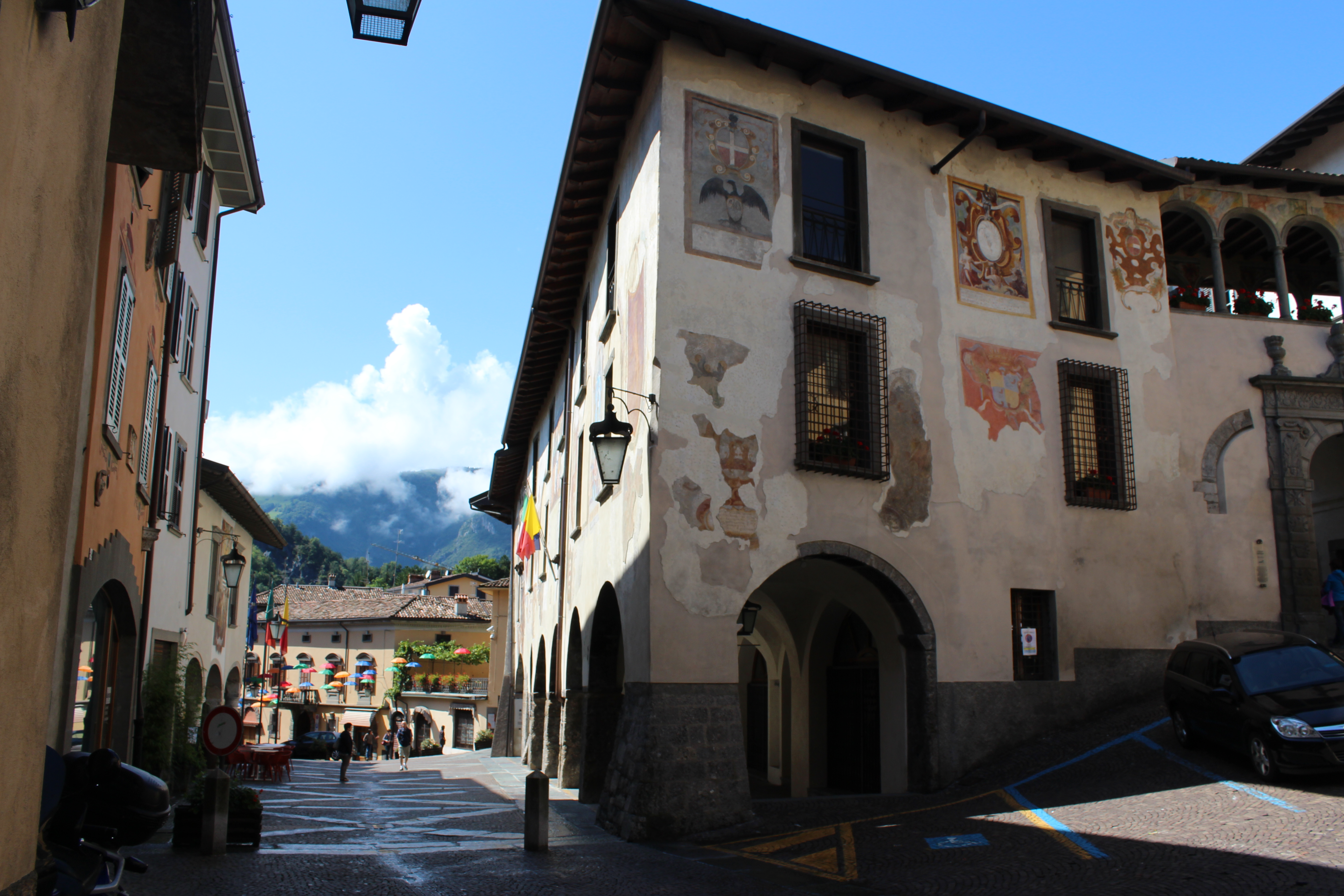 Palazzo Comunale (ala nord-sud e cortile con vista da Piazza Orologio) This is a photo of a monument which is part of cultural heritage of Italy.